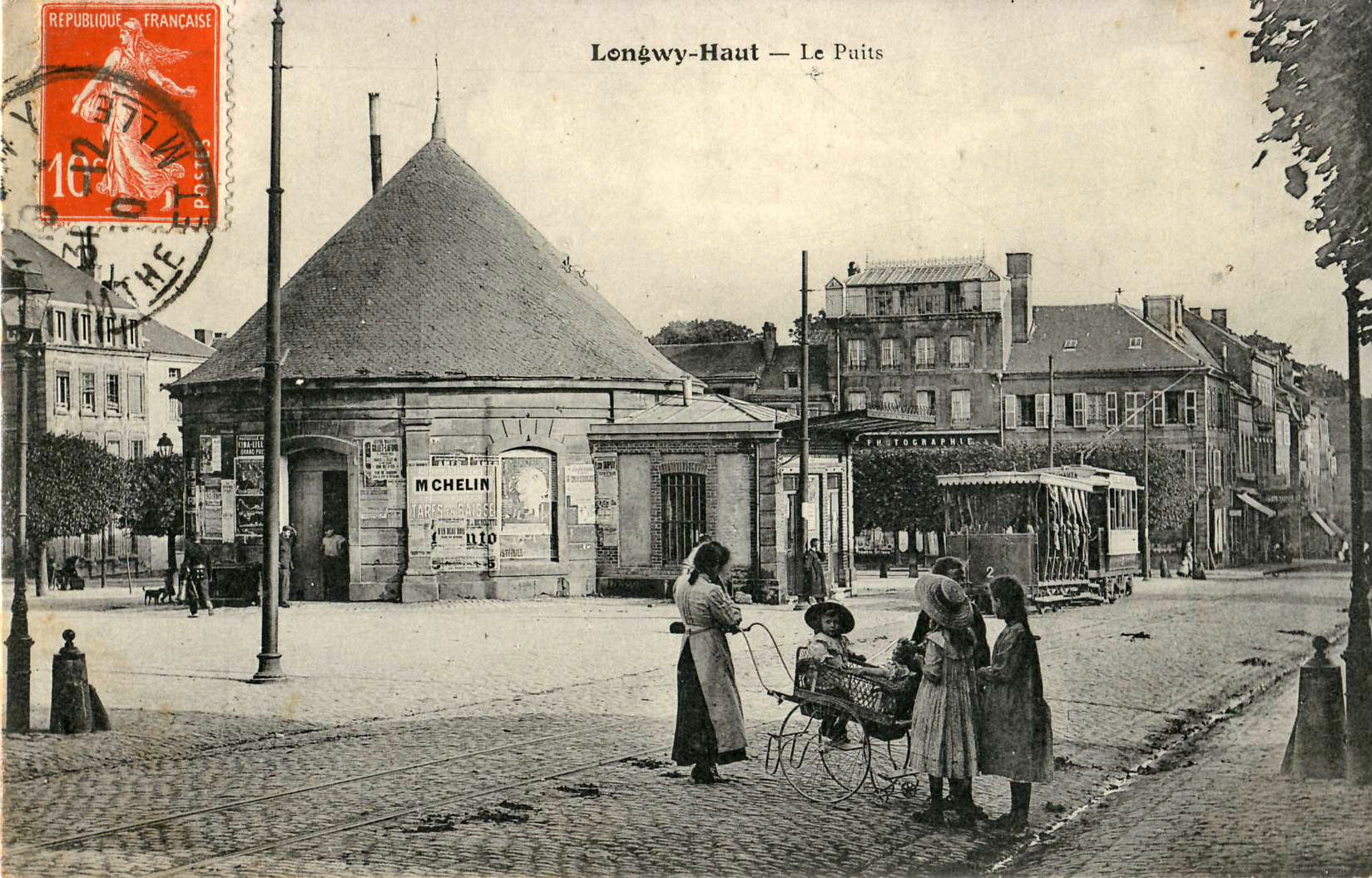 Carte postale ancienne éditée par V. Kremer à Longwy-Haut, série A, n°94 : LONGWY-HAUT - Le Puits